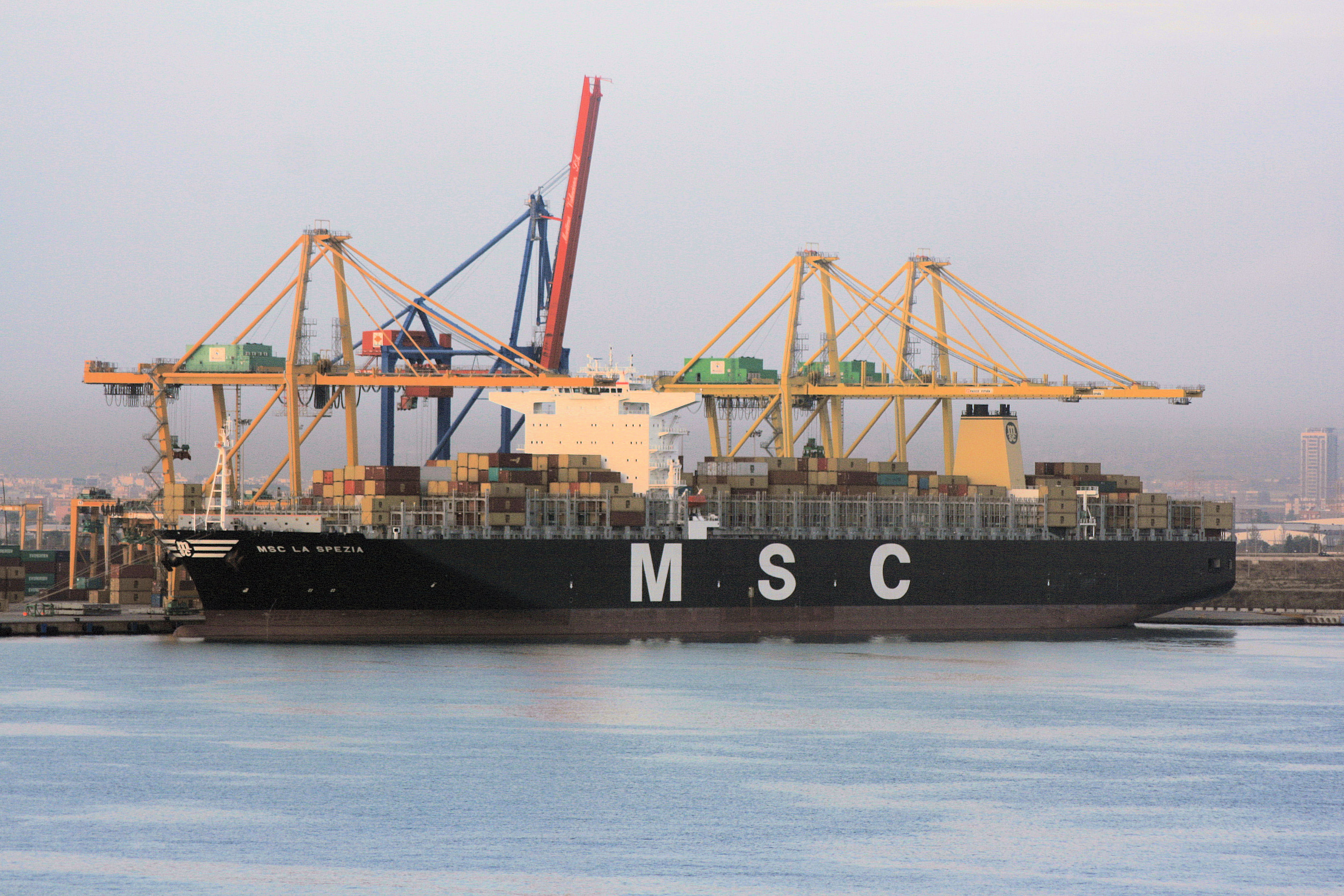 Containerschiff der MSC